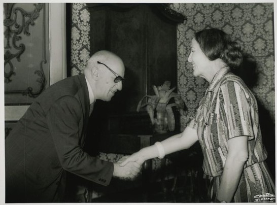 Il Presidente della Camera dei Deputati Nilde Iotti riceve il governatore della Banca d'Italia Paolo Baffi